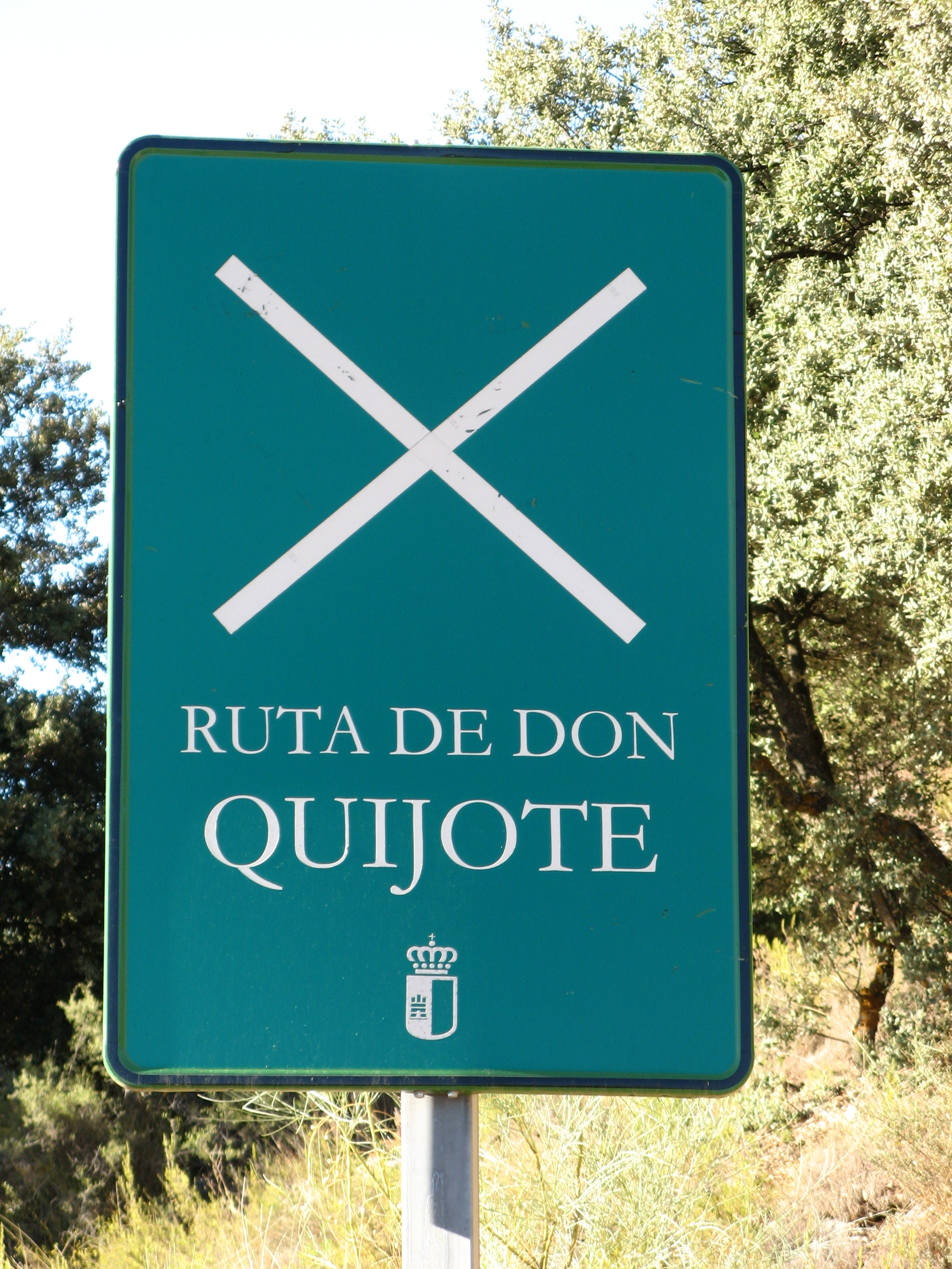 Ruta de Don Quijote Ruidera. Provincia de Ciudad Real Castilla-La Mancha España